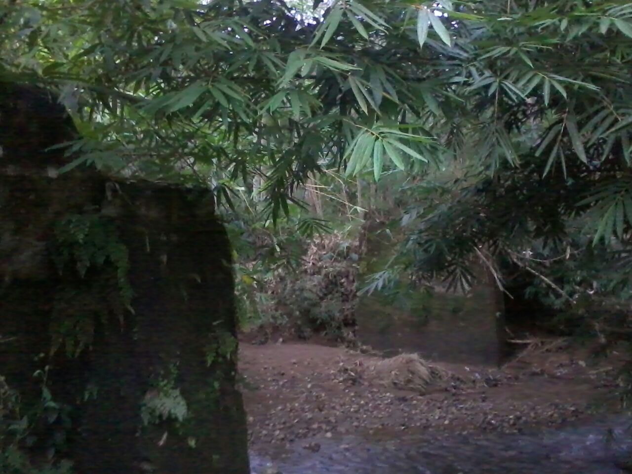 Bekas fondasi dari Jalur kereta api Tulungagung-Tugu, lokasi sekitar Stasiun Tugu (Trenggalek).